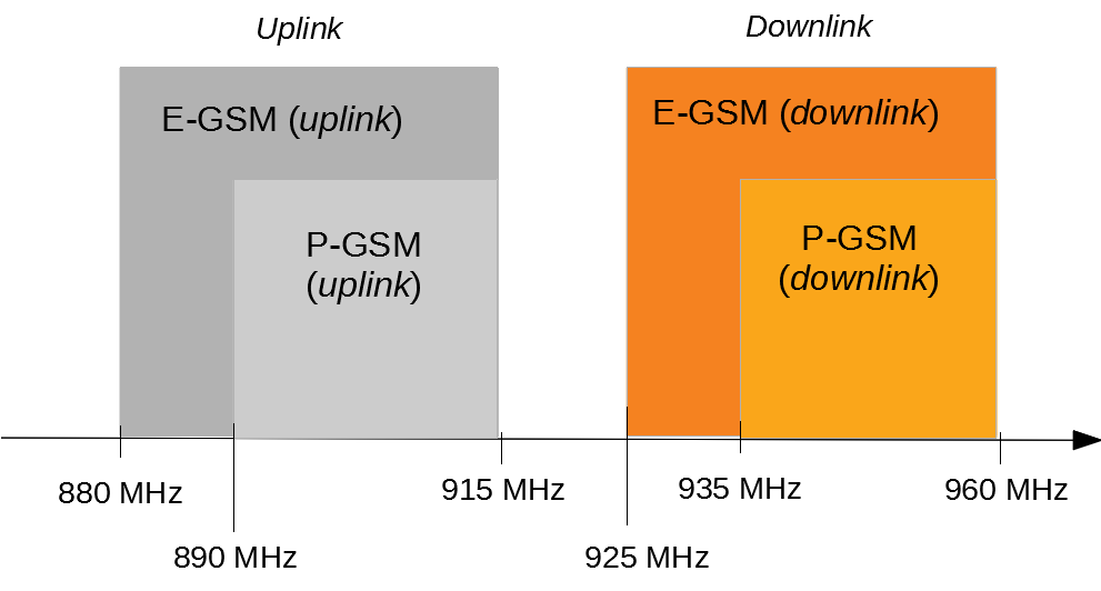 Zestawione ze sobą pasma P-GSM i E-GSM używane w tech. komórkowych GSM. E-GSM jest rozszerzeniem pierwotnie używanych częstotl. zwanych GSM 900. Rysunek pokazuje zarówno pasmo "w górę" (ang. uplink) - na niższych częstotliwościach, jak i "w dół" (ang. downlink) - wyższe częstotliwości.